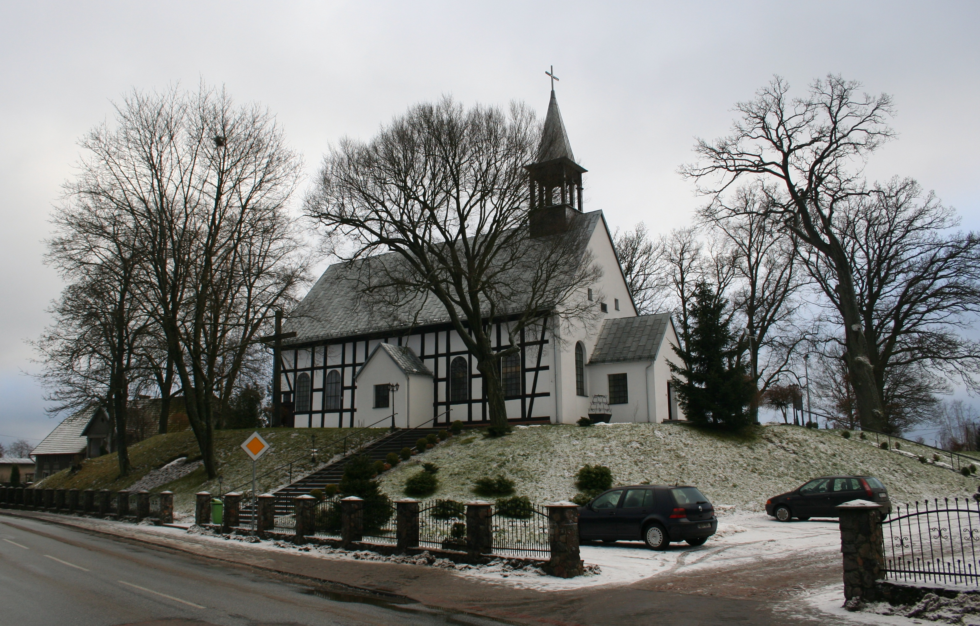 Kościół Chrystusa Króla w Kołczygłowach